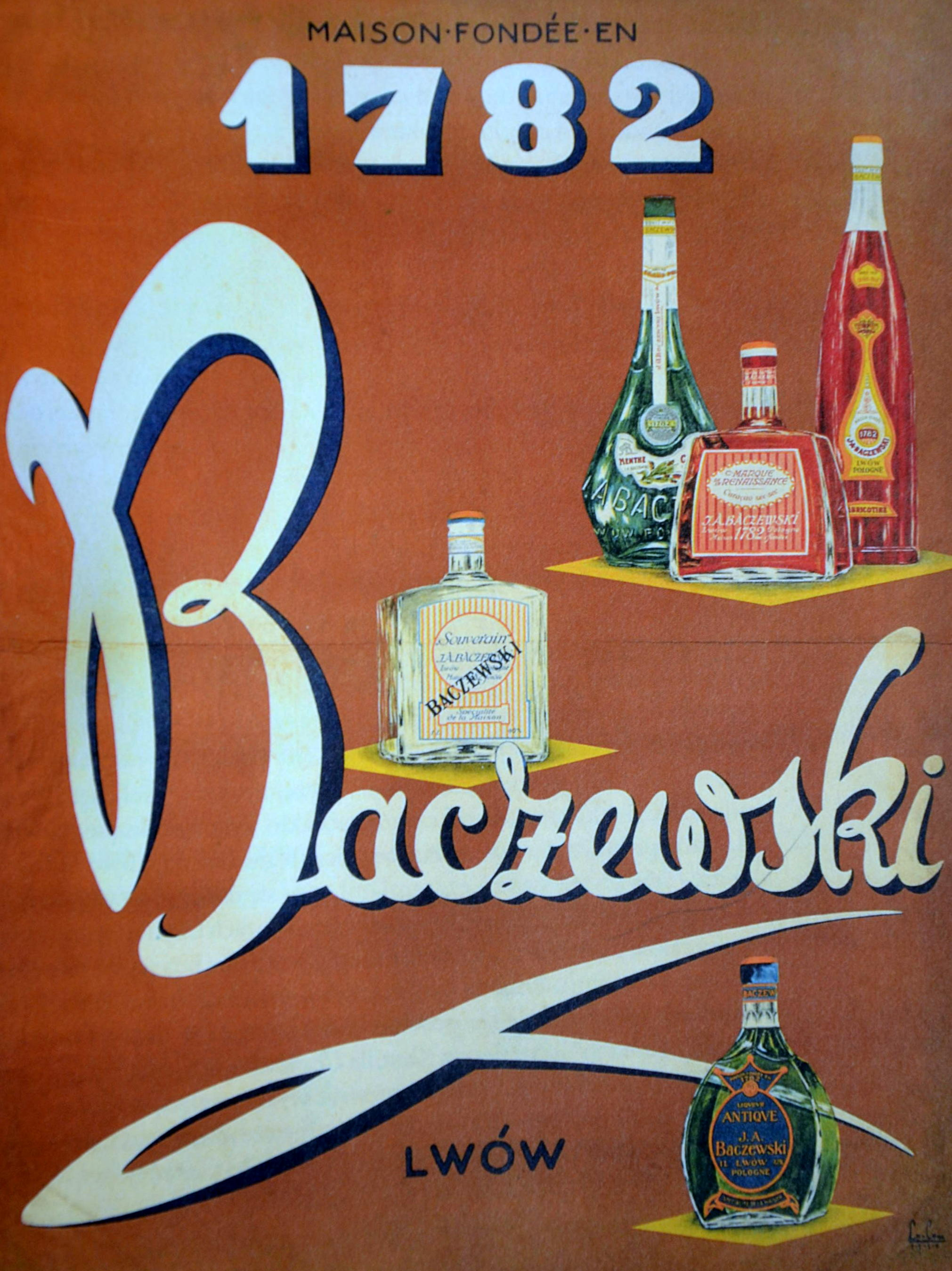 Baczewski Vodka 1914